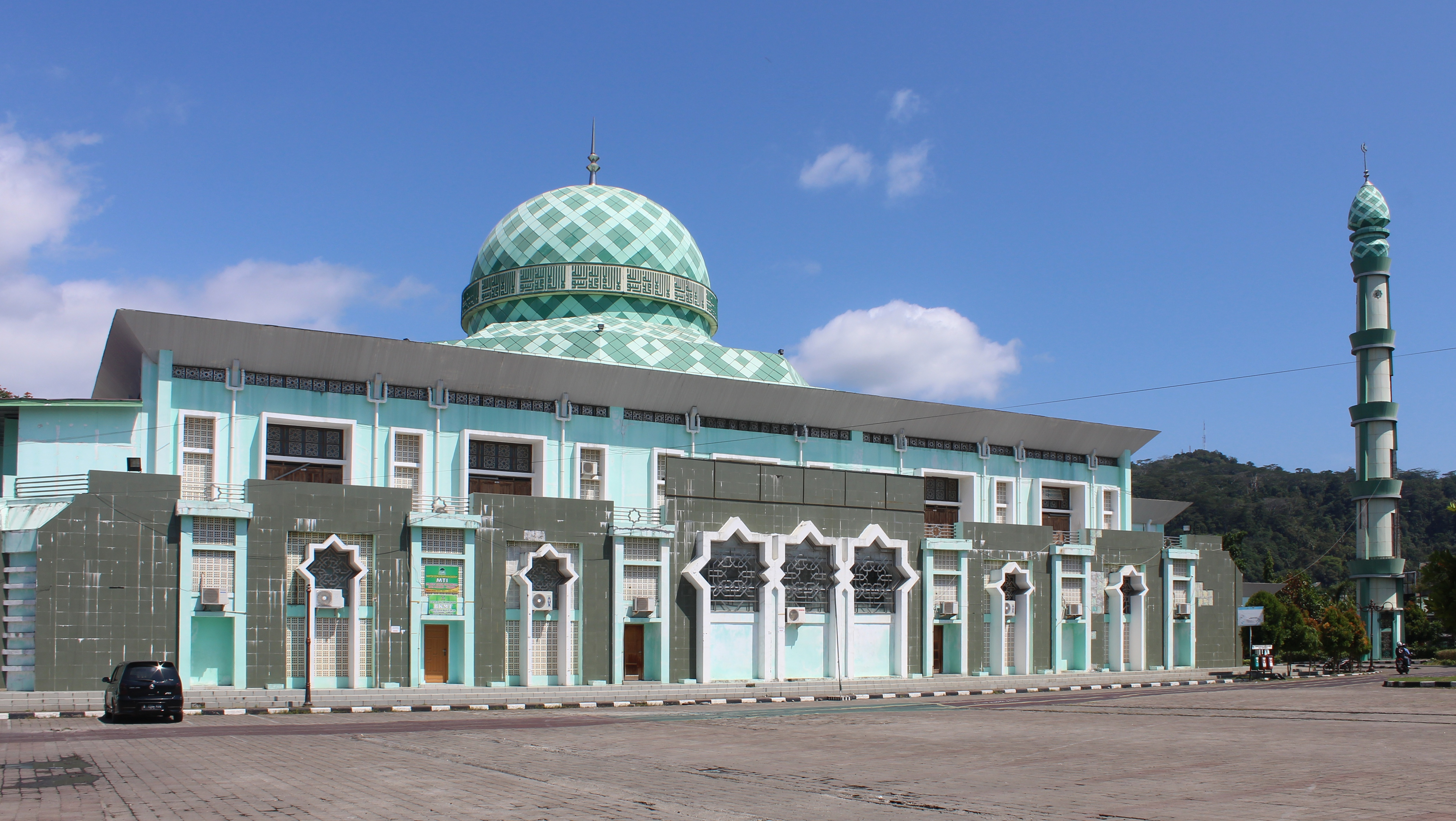 Masjid Agung Nurul Iman